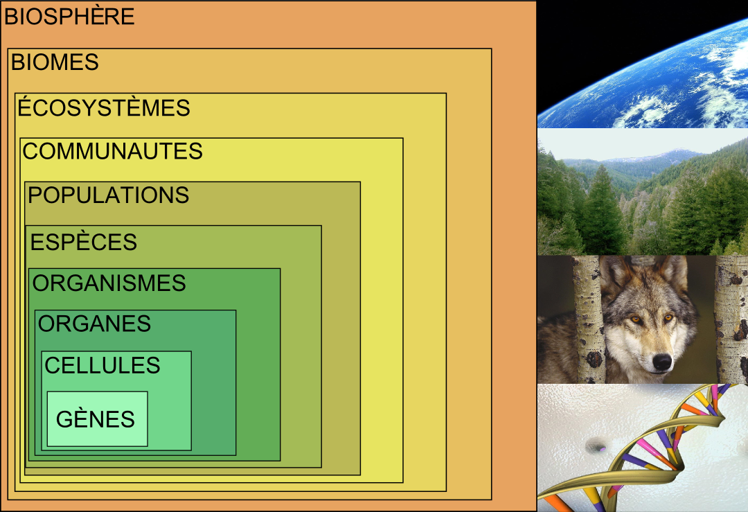 Différents niveaux d'organisation du monde vivant.